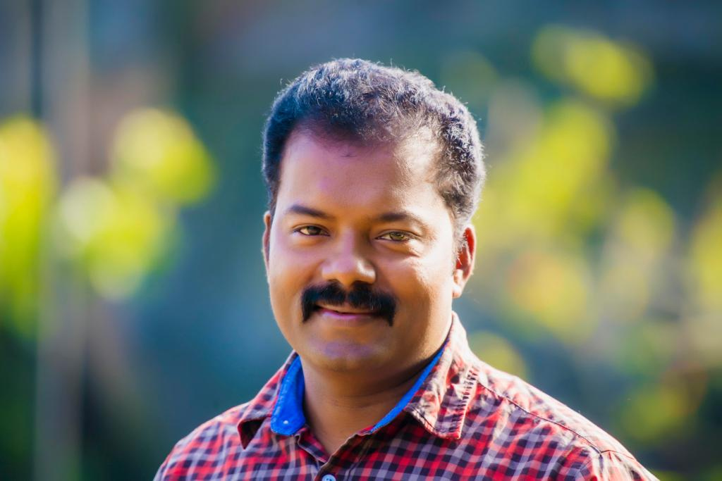 പഴനി സ്വാമി